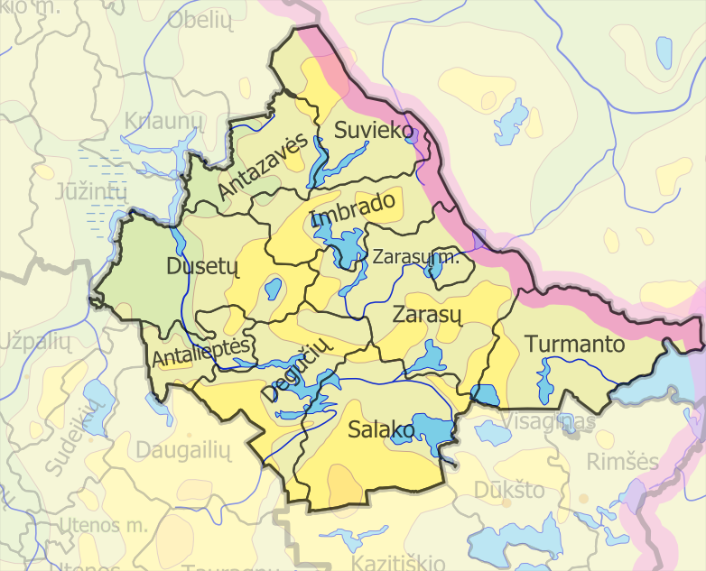 Padaryta iš :image:LietuvosSeniunijos.png